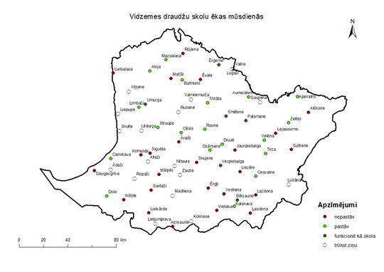 Vidzemes draudžu skolu ēkas 2018. gadā